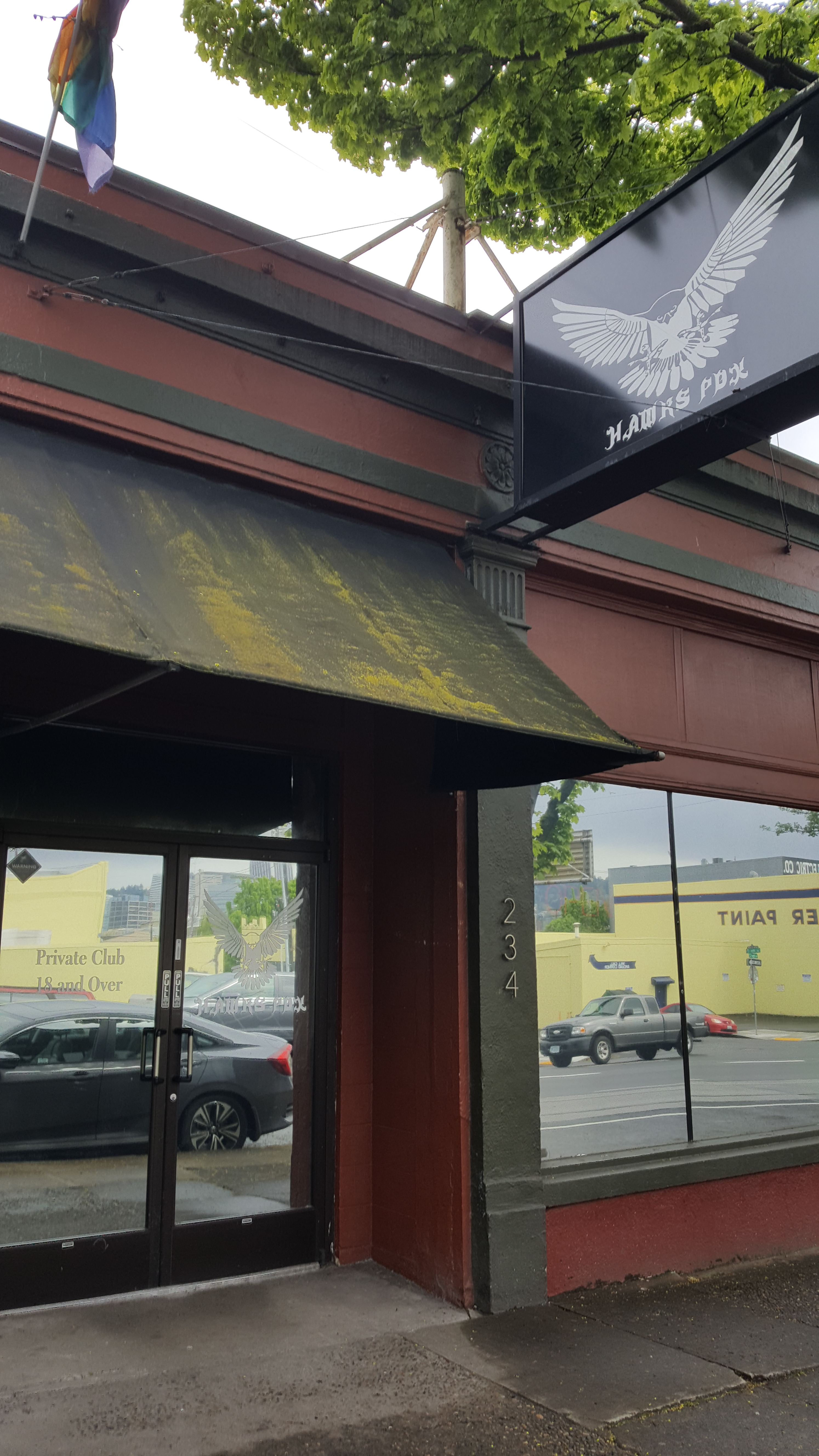 Hawks PDX